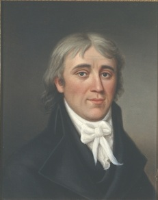 Portrett av Hans Hein Nysom. Signert P. Meidell 1860